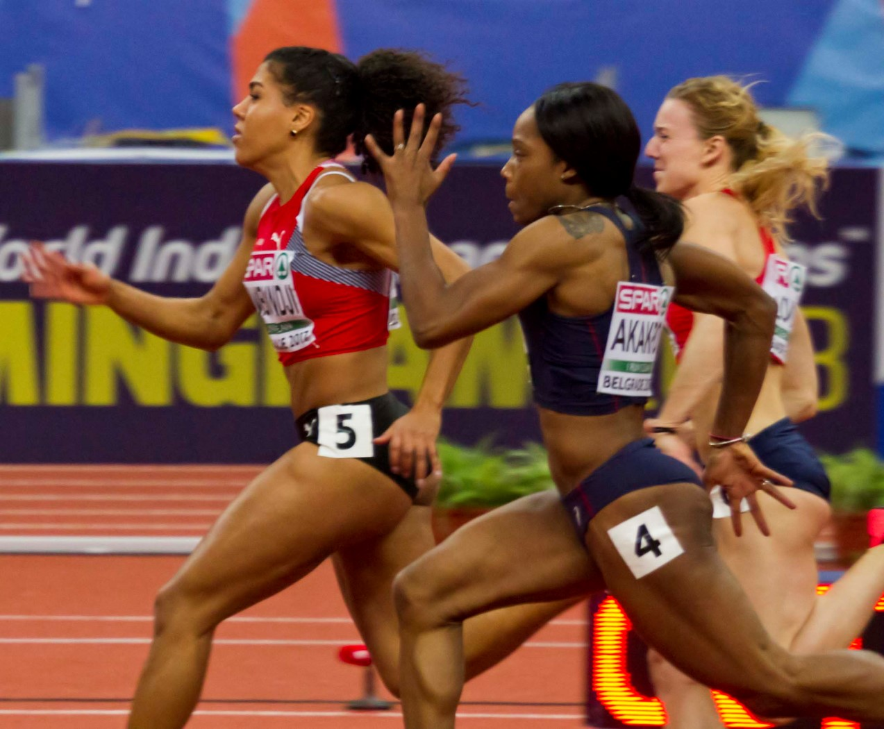 021 reeksen 60m kambundji